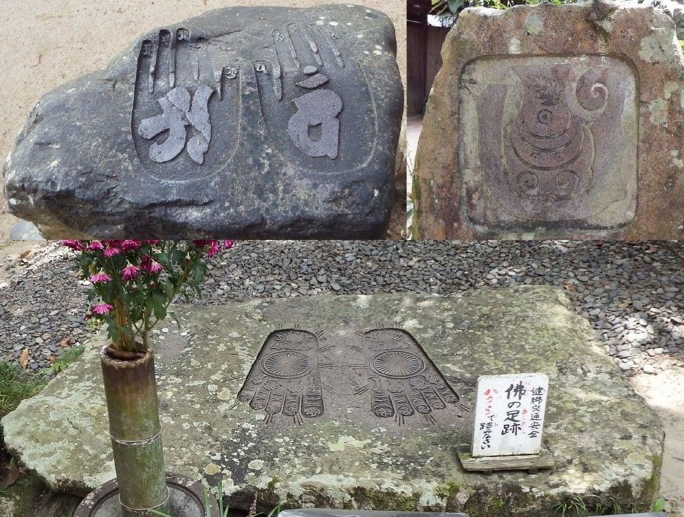 浄瑠璃寺の手判、花判、仏足石